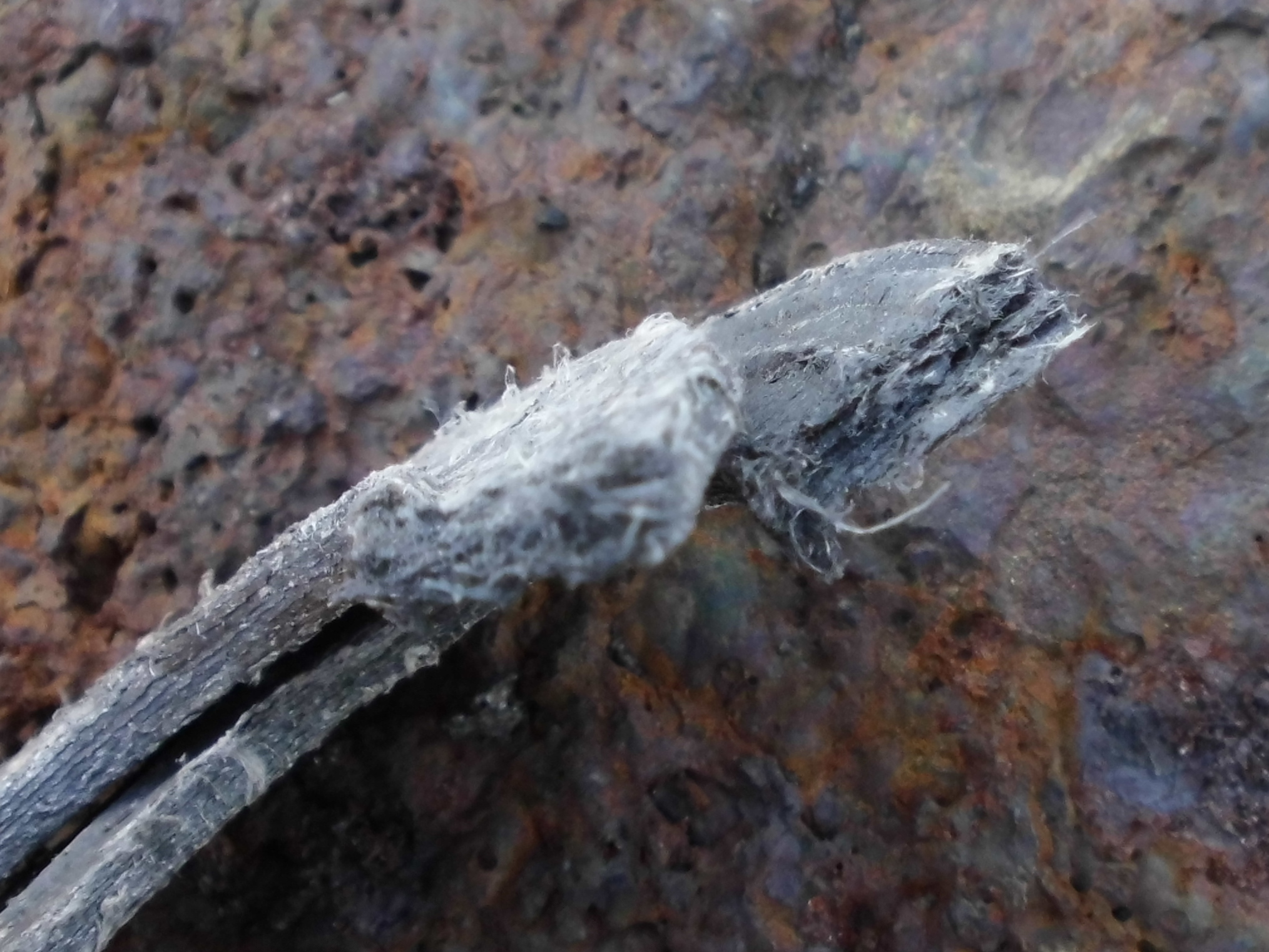 Фланцевая уплотнительная прокладка бывшая в употреблении (герметизация стыков трубопровода со сжатым воздухом). Структура на изломе.